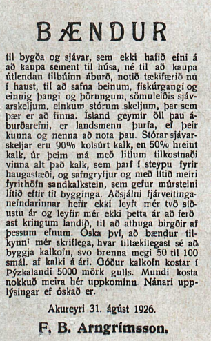 Auglýsing frá F. B. Arngrímssyni í Degi 3. september 1926 um ábendingar um góða staði fyrir kalkverksmiðjur.